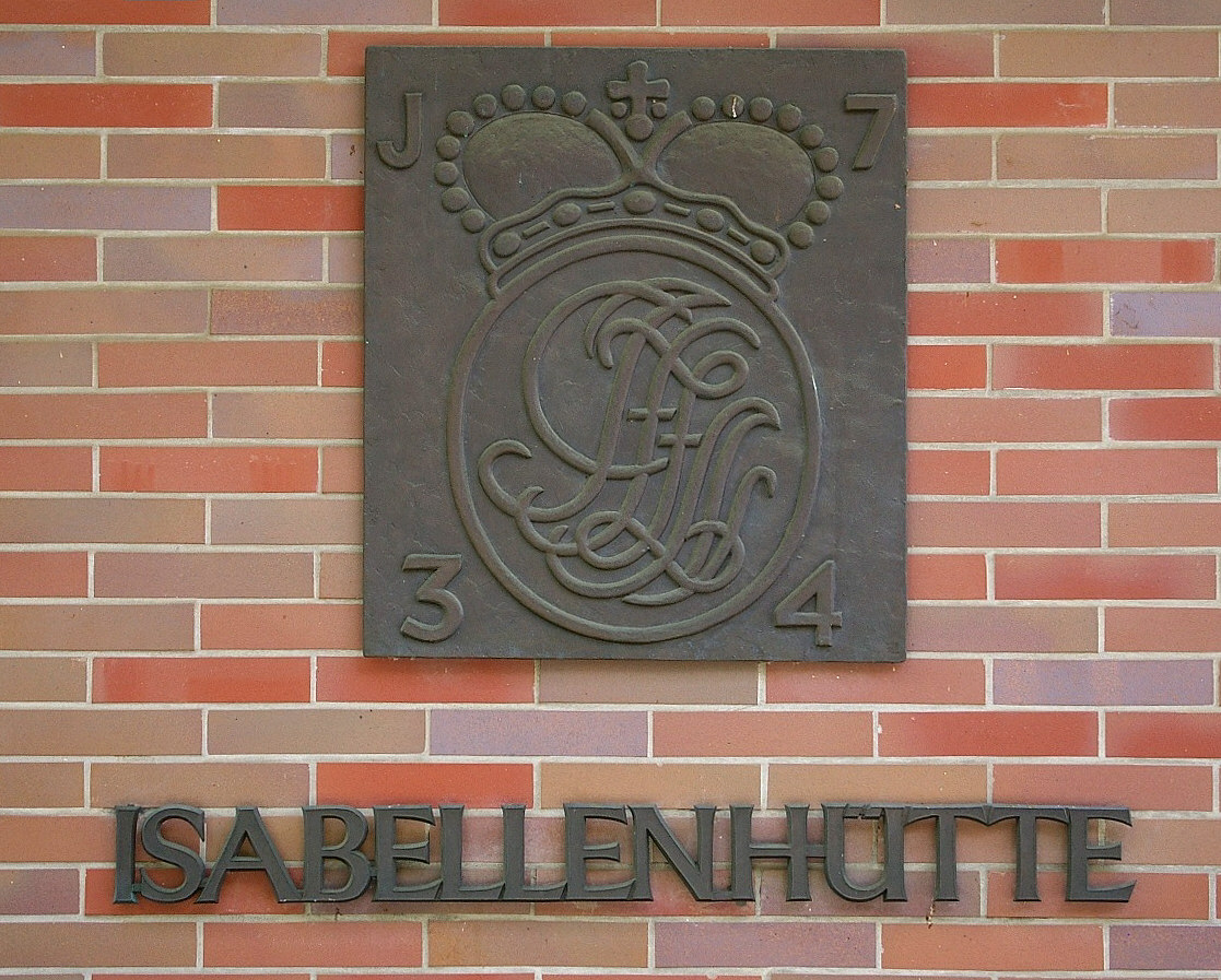 Das Firmenzeichen der Isabellenhütte in Dillenburg trägt in den vier Ecken die Zeichen „J734“, was für das Jahr 1734 steht, welches nicht das Gründungsjahr 1728 ist. Ursprünglich stammt es von einer Torverzierung die an eine neben der Kupferhütte befindliche Vitriol-Siederei erinnert. In der Mitte des Zeichens befinden sich die Initialen „I. C. F. z. N.“ von Isabella Charlotte Fürstin zu Nassau.[1]